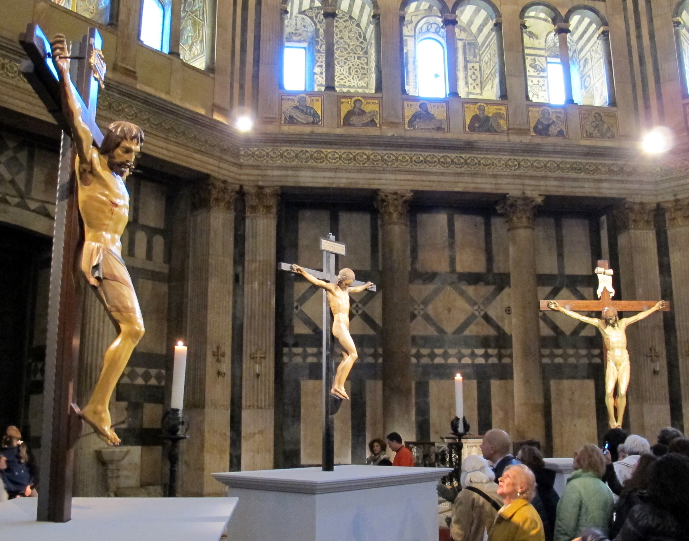 Installazione florens 2012 crocifissi